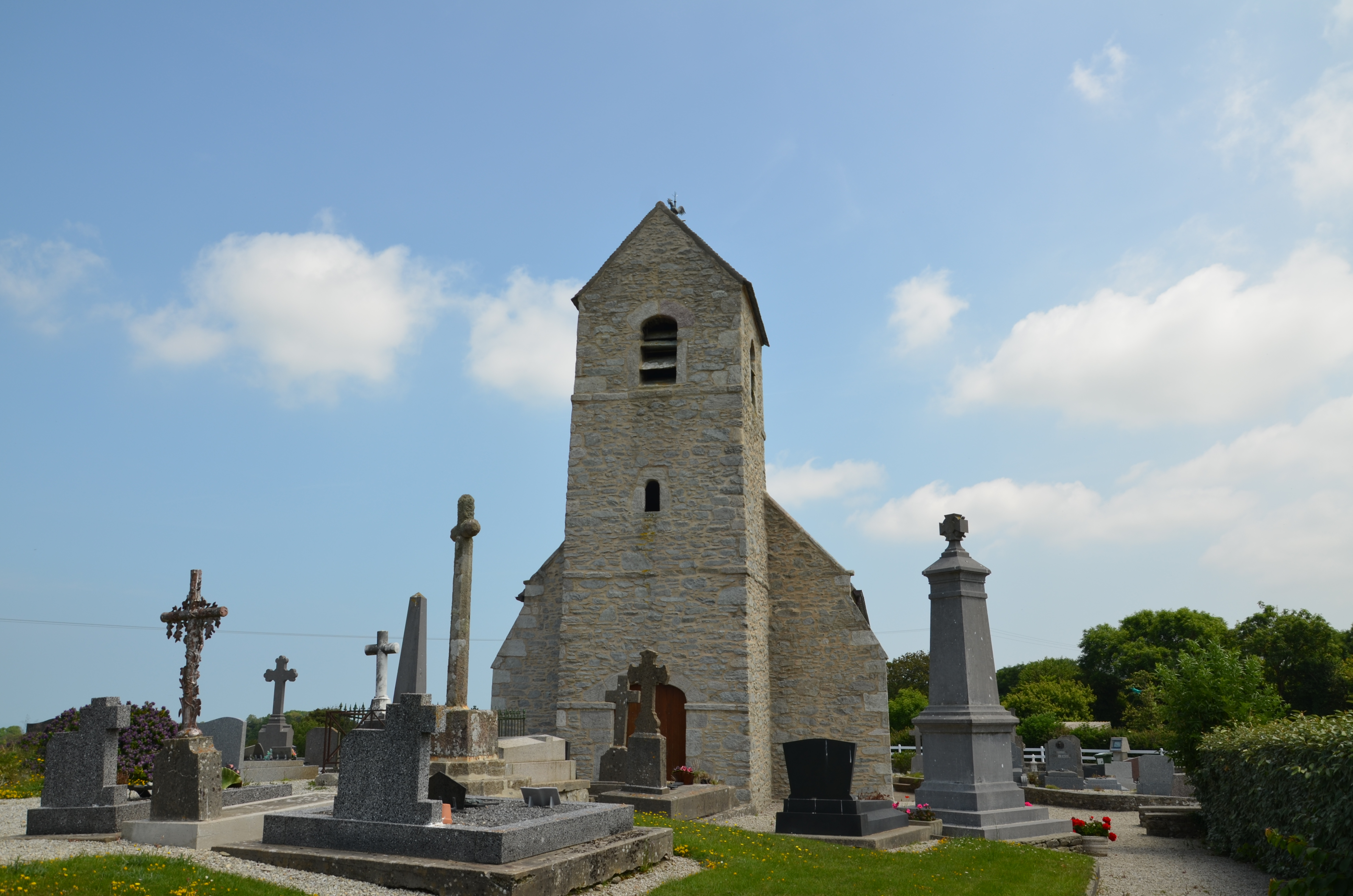 Église Saint-Martin de Tonneville.